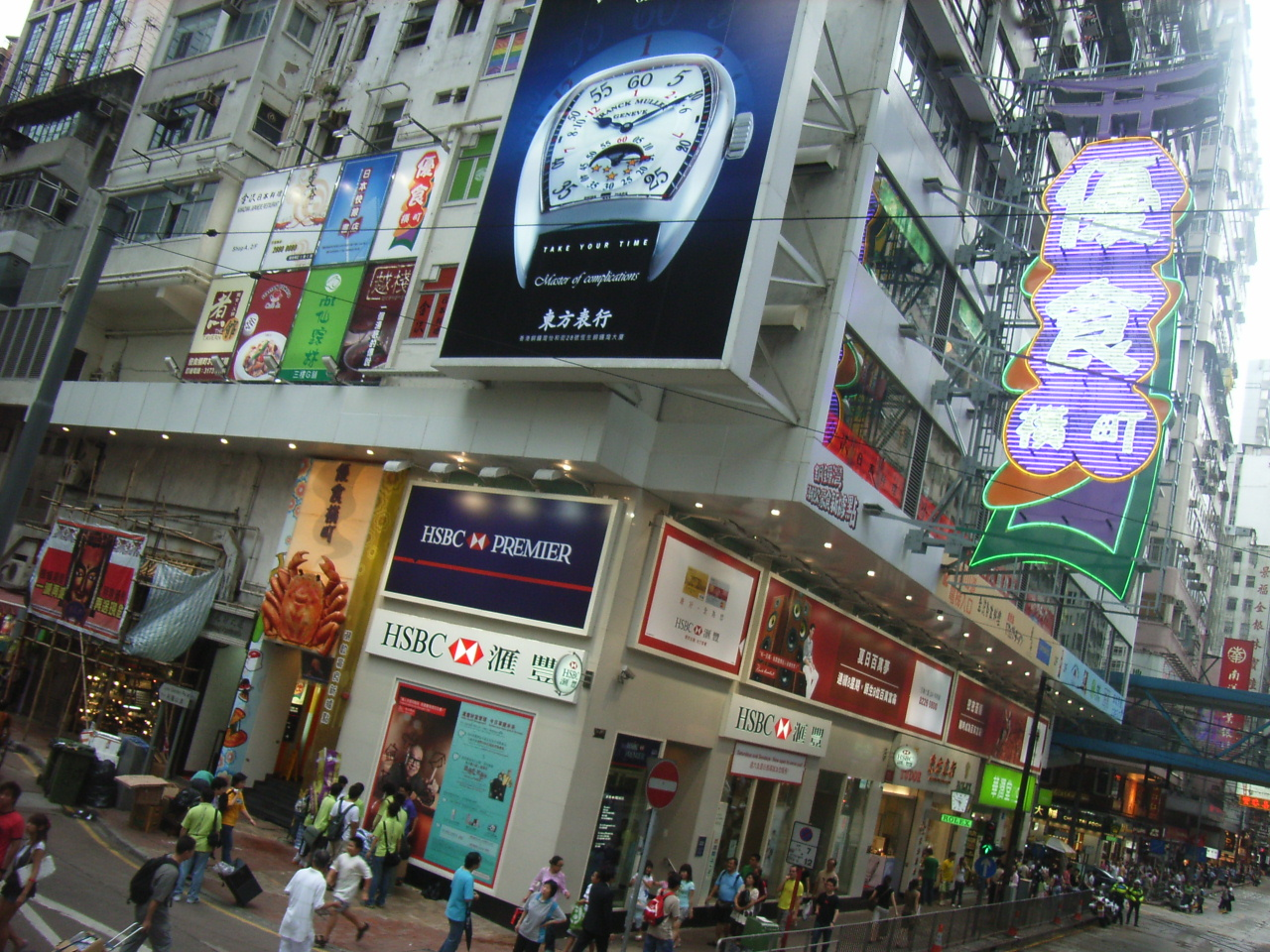 香港島 灣仔區 軒尼詩道